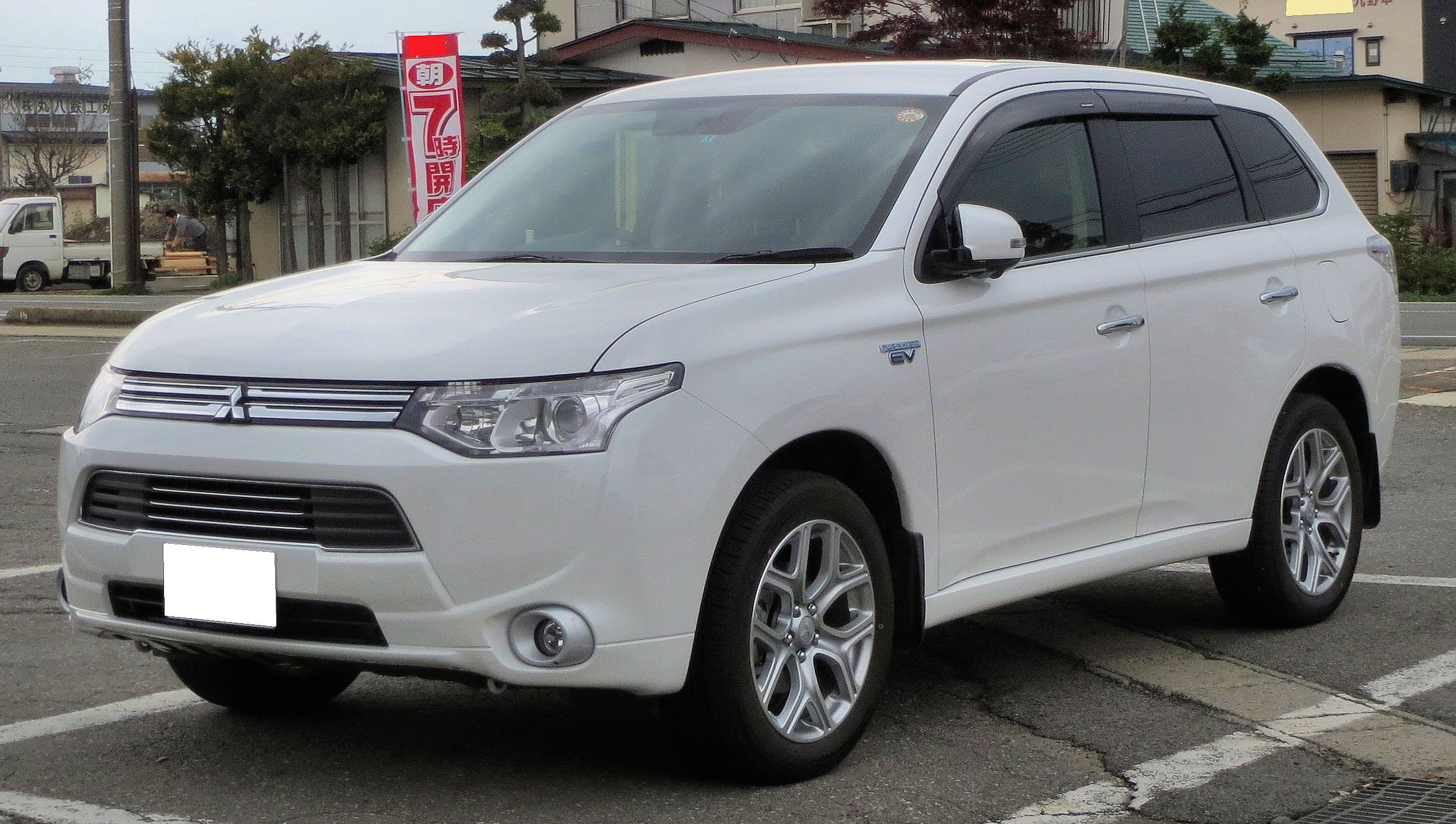 三菱アウトランダーPHEV